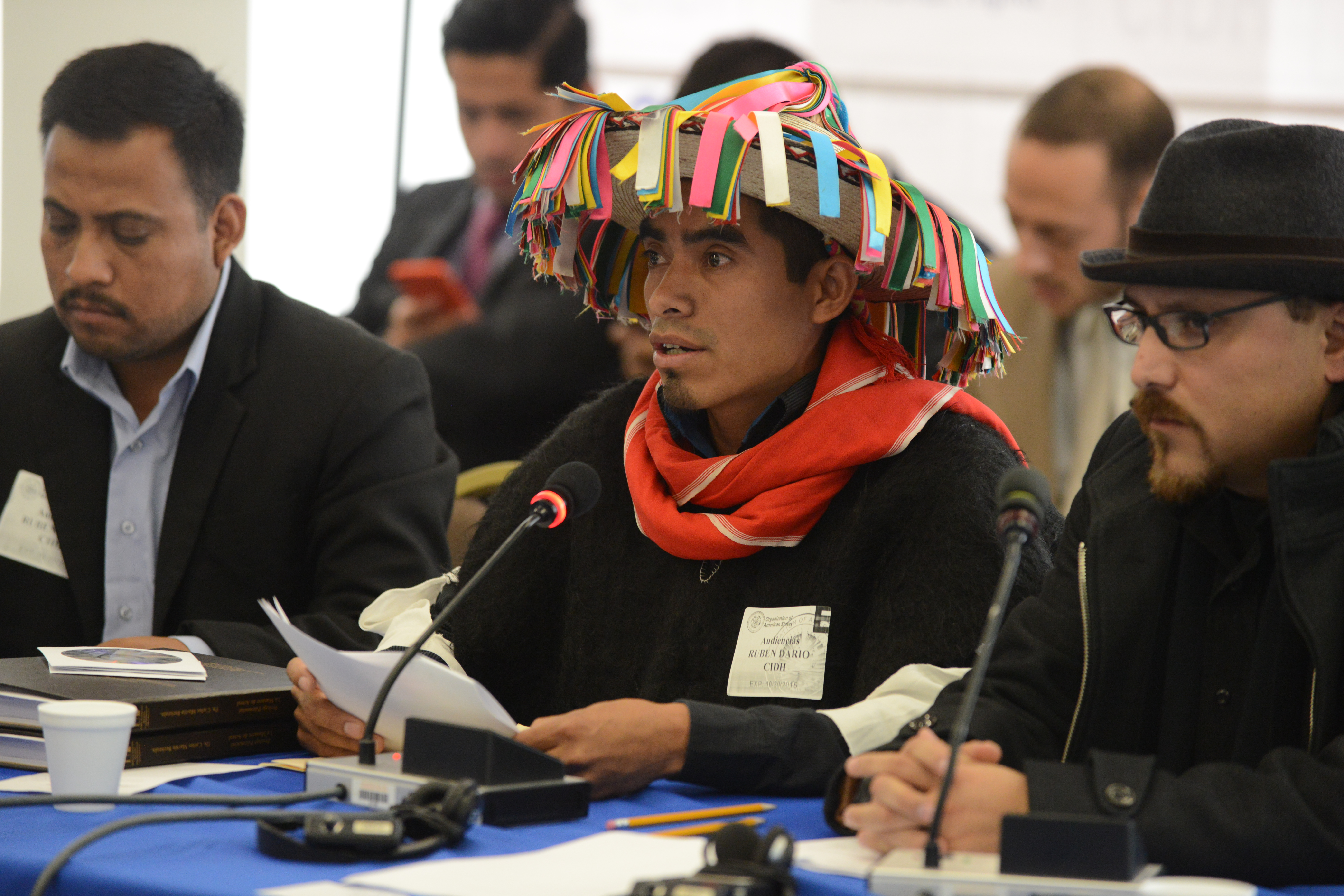 Caso acteal cidh